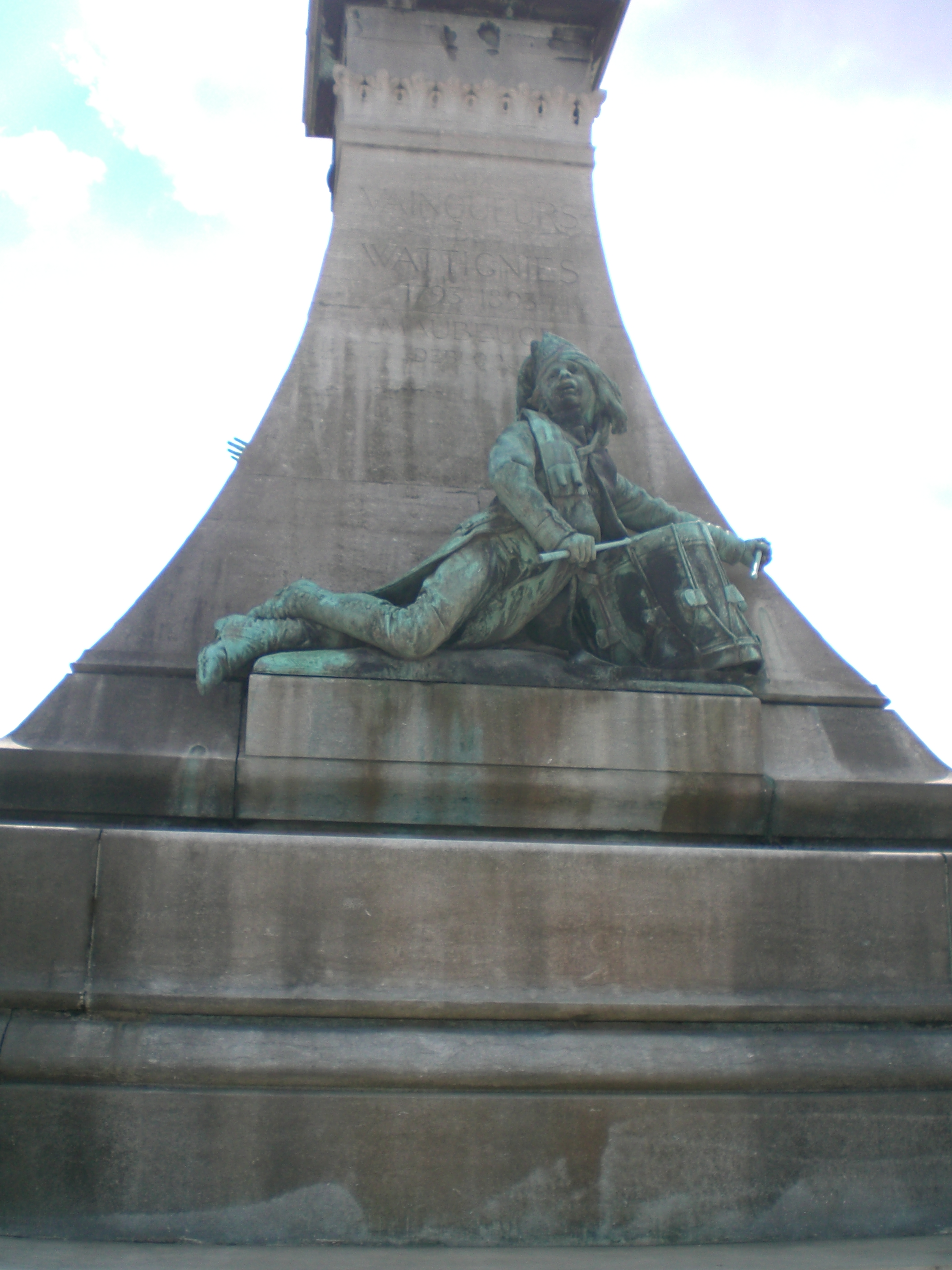 statue de Stroh qui accompagne la statue des vinqueurs de Wattignies à Maubeuge